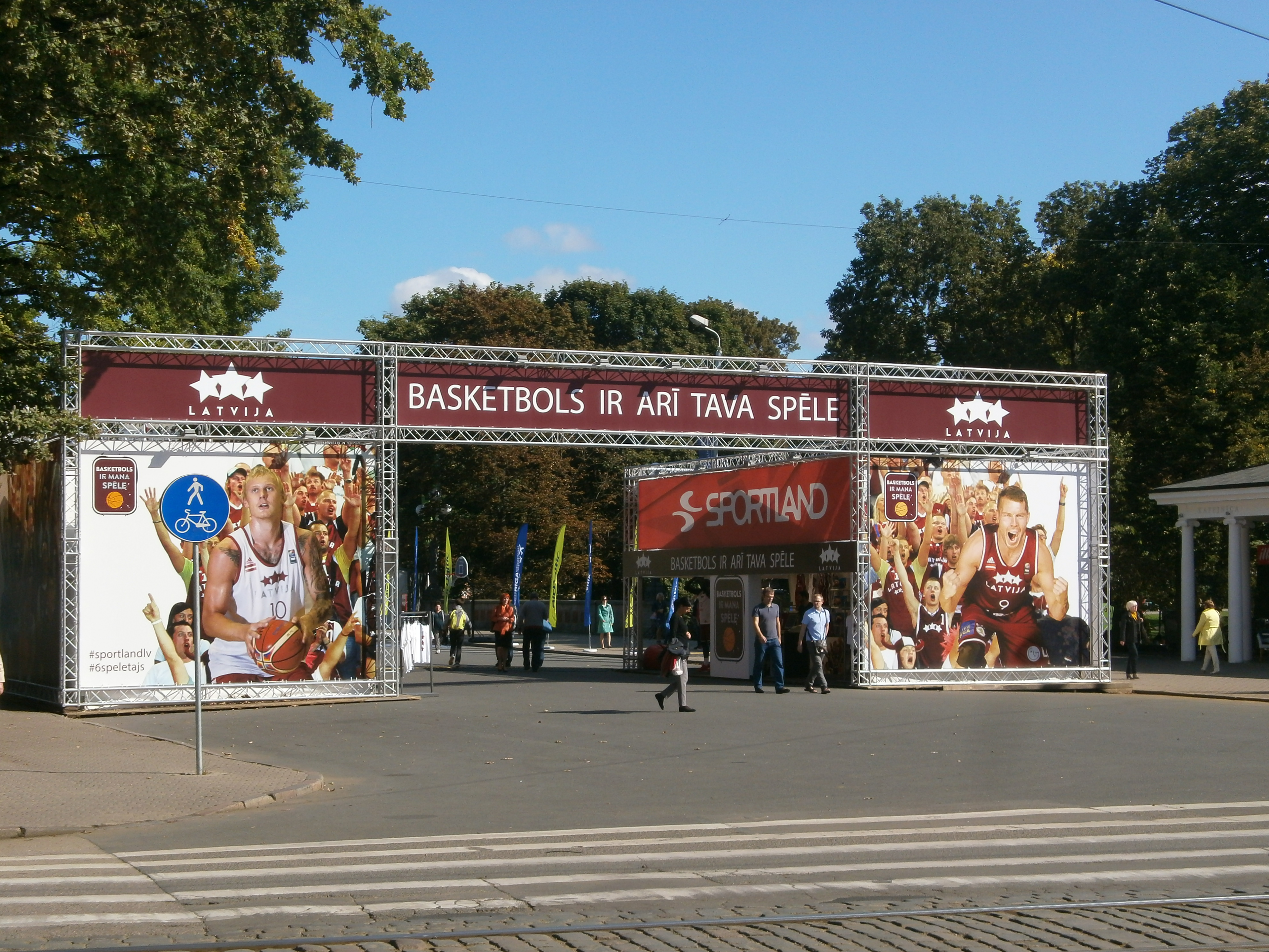 2015. gada Eiropas čempionāta basketbolā finālturnīra fanu zona Rīgā